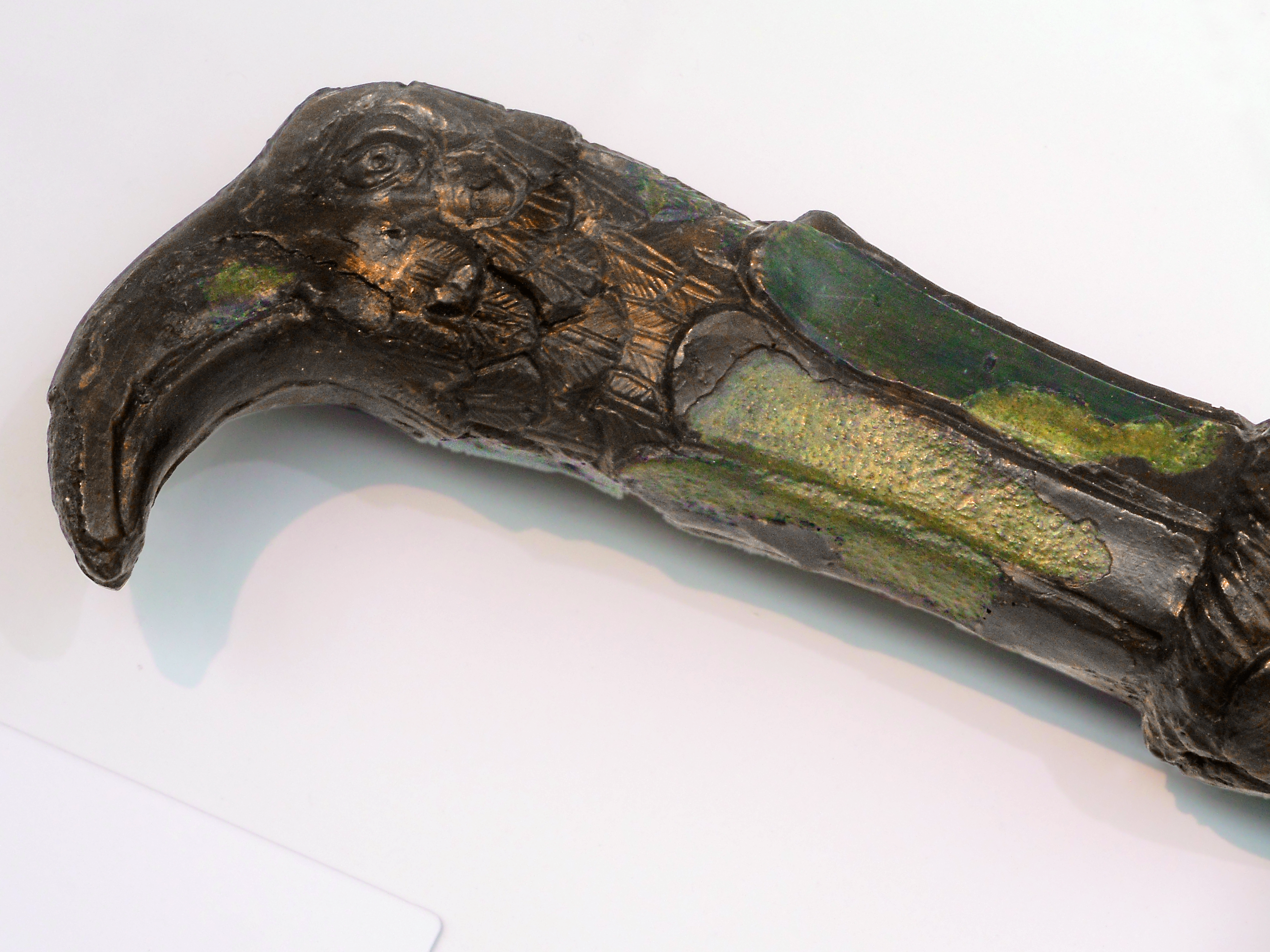 Kastell Murrhardt: Schwert mit Adlerknauf, gefunden 1954. Photographiert am Samstag nach des Neueröffnung des Limesmuseums Aalen. Archbau GmbH Bayern, Studienfahrt.